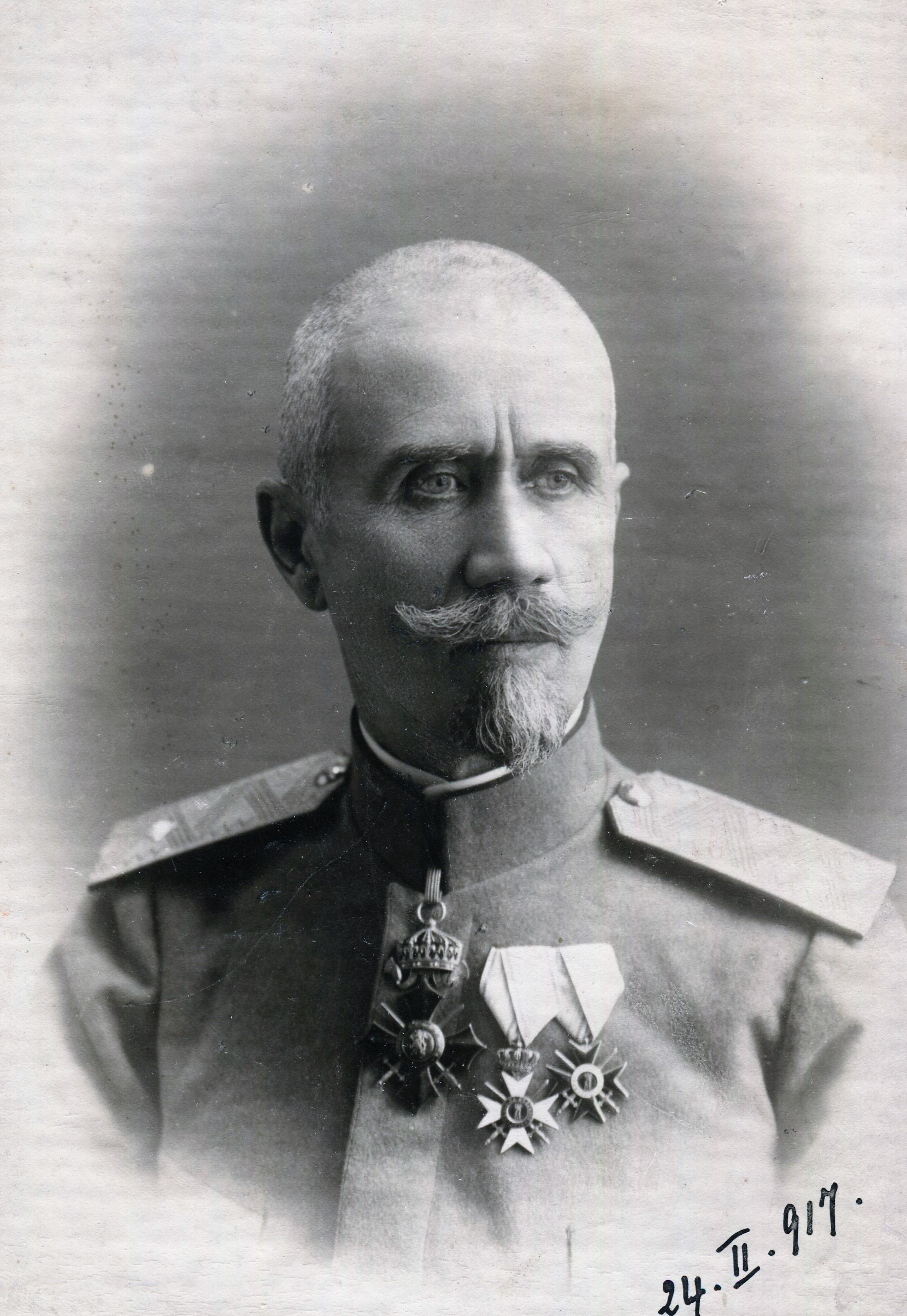 ген. Спас Чилингиров с ордените, 24.02.1917